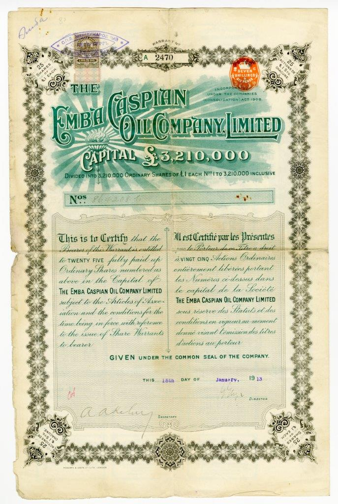 Сертификат на 25 обыкновенных полностью оплаченных акций Общества с ограниченной ответственностью "Эмба Каспийская нефтяная компания" ("The Emba Caspian Oil Company, Limited") с основным капиталом в 3,21 млн.ф.ст. Лондон, 1913 г.